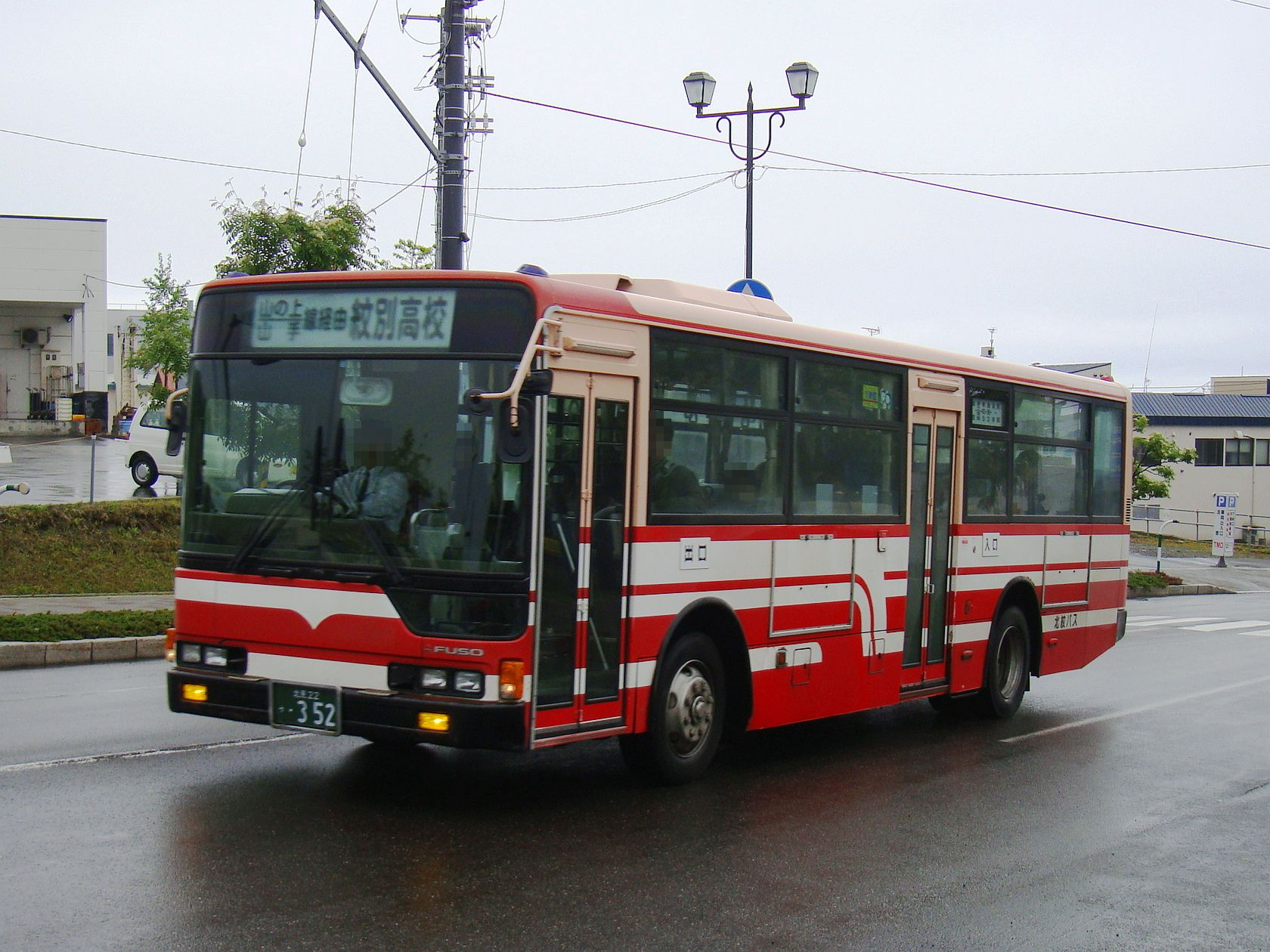 Okoppe to Monbetsu